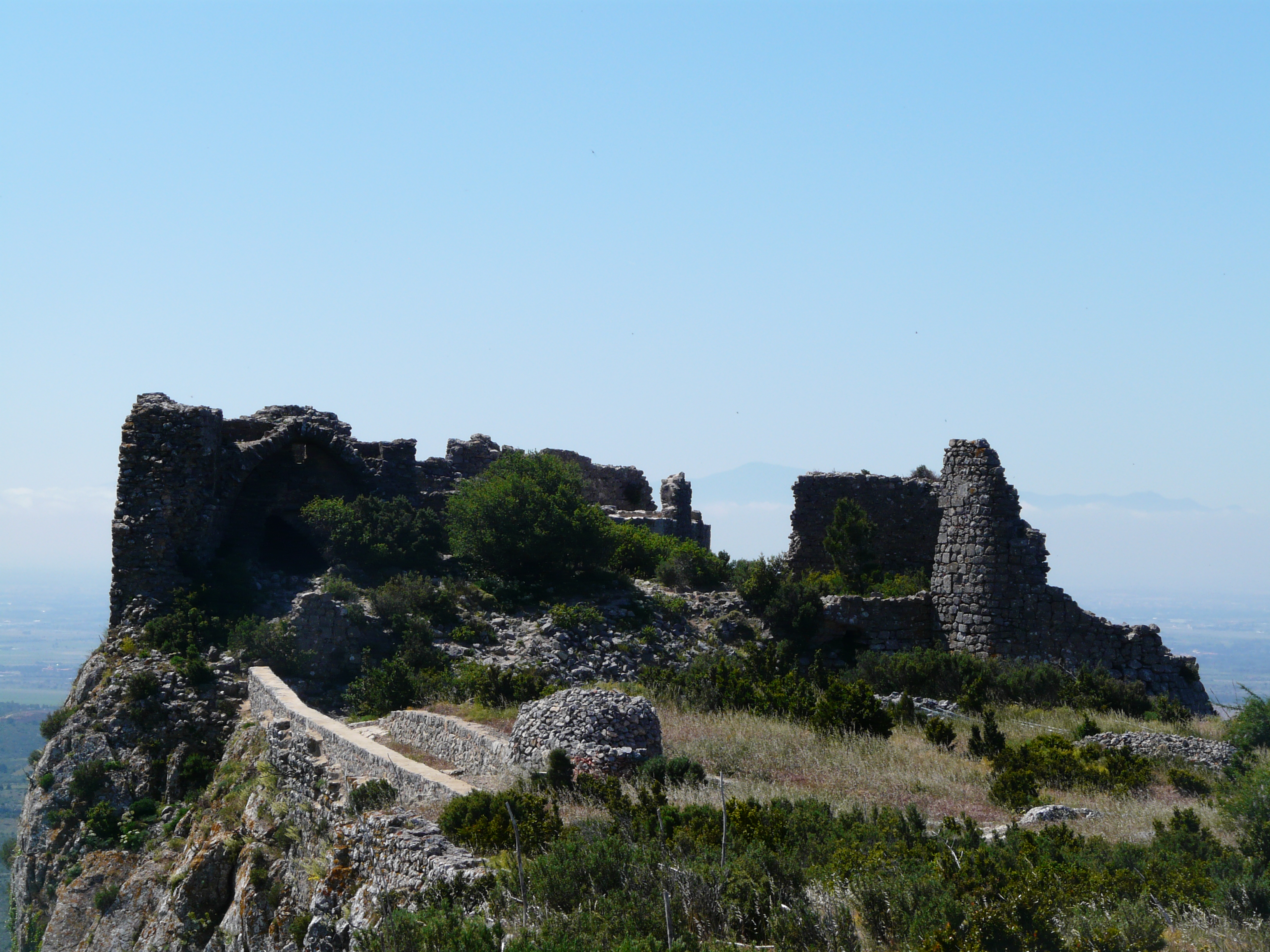 Conjunt de les ruïnes del castell, des del nord